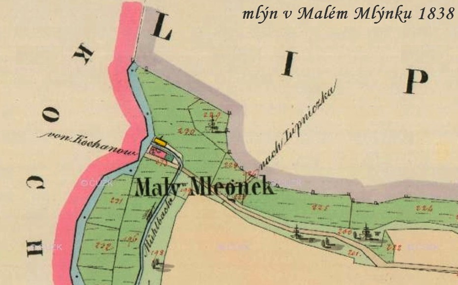 mlýn v Malém Mlýnku pod Kochánovem - část císařského otisku stabilního katastru 1838